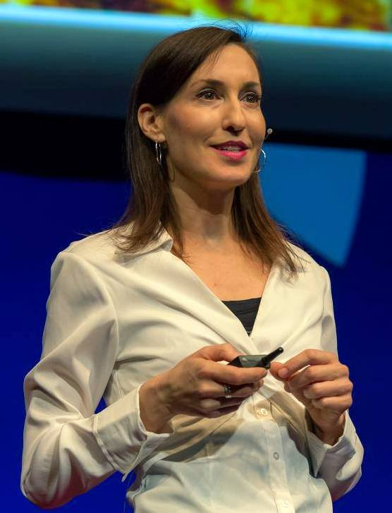 Melanie TEDX